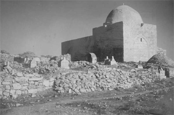 בית לחם - קבר רחל